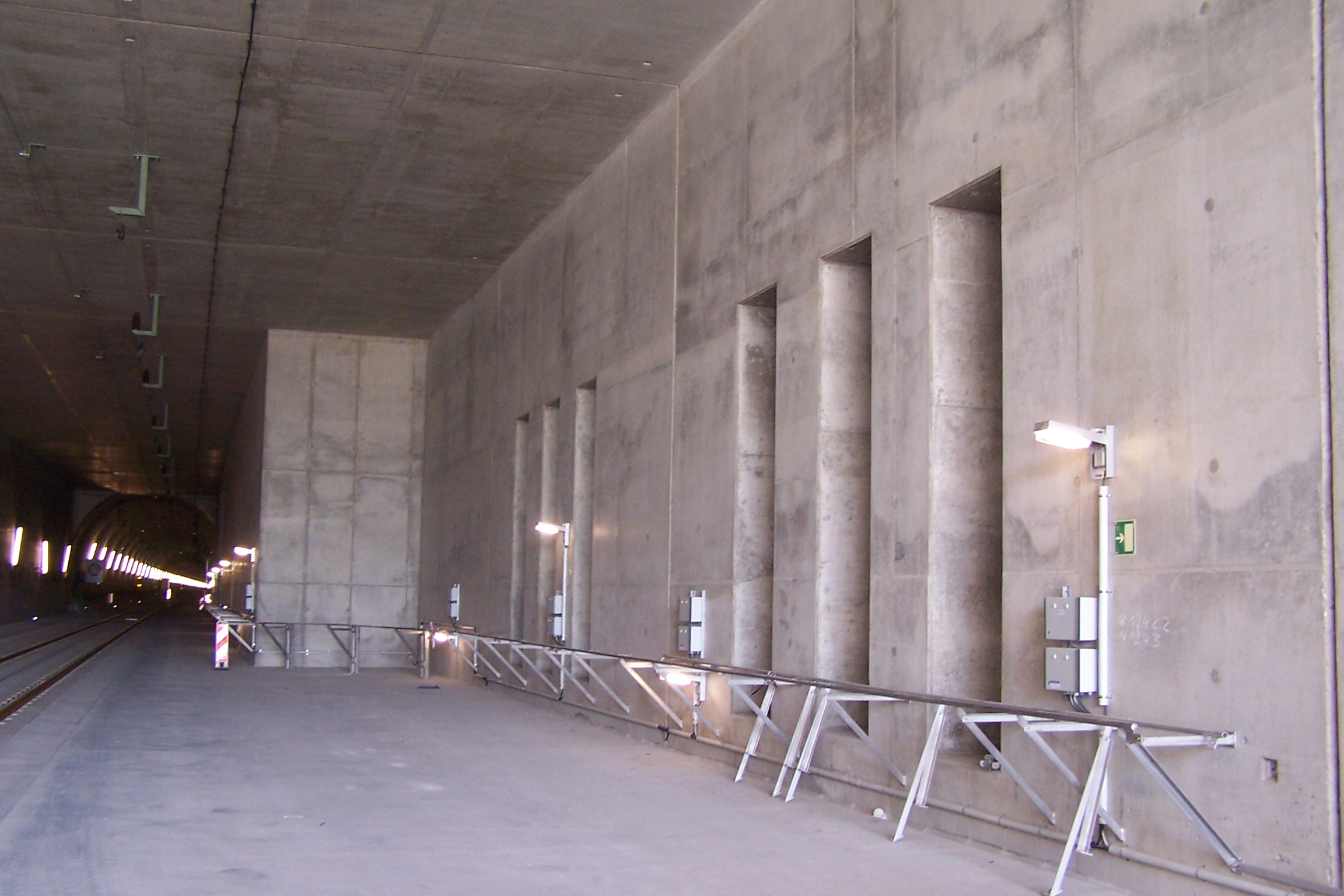 Sonic Boom Bauwerk in der Weströhre am Südportal des Katzenbergtunnels, durch diese sollen sich die Druckwellen ausweiten.